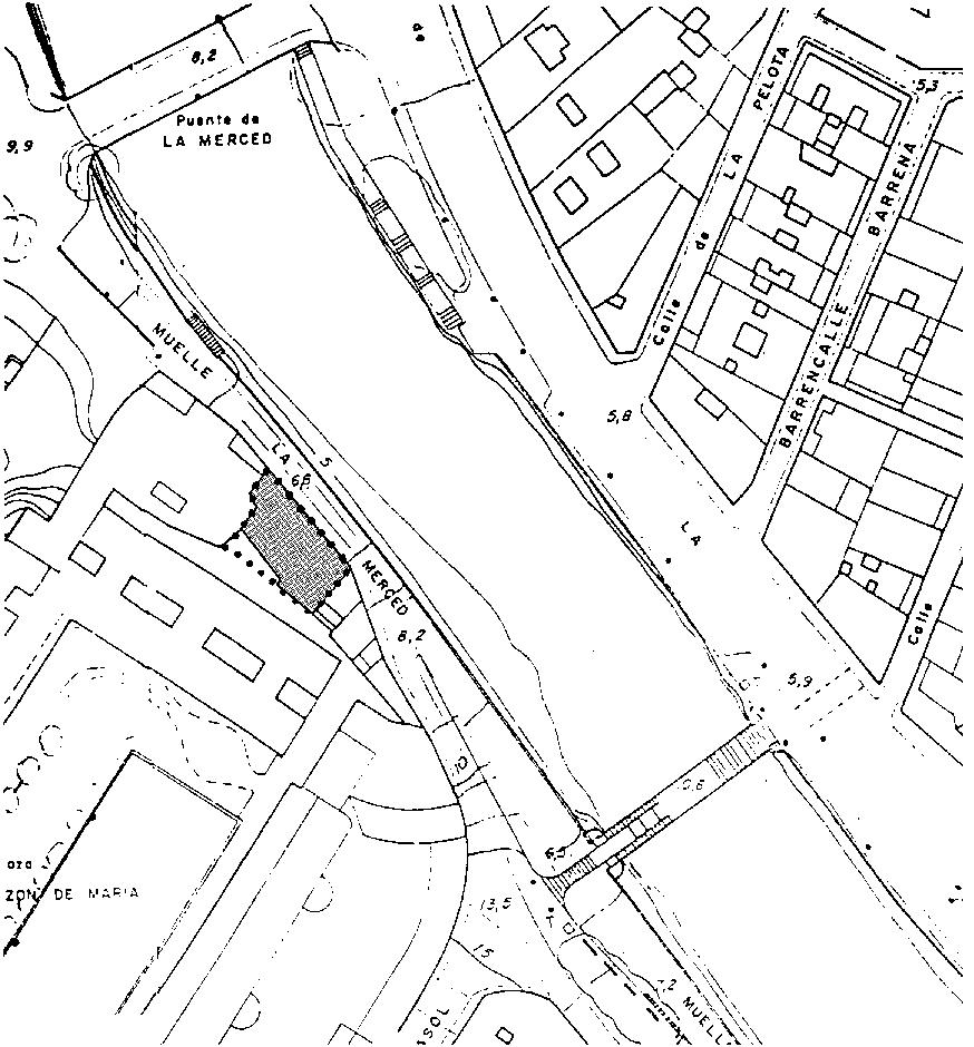 La Ceres irin-lantegiaren kokapen-planoa, Bilbo.